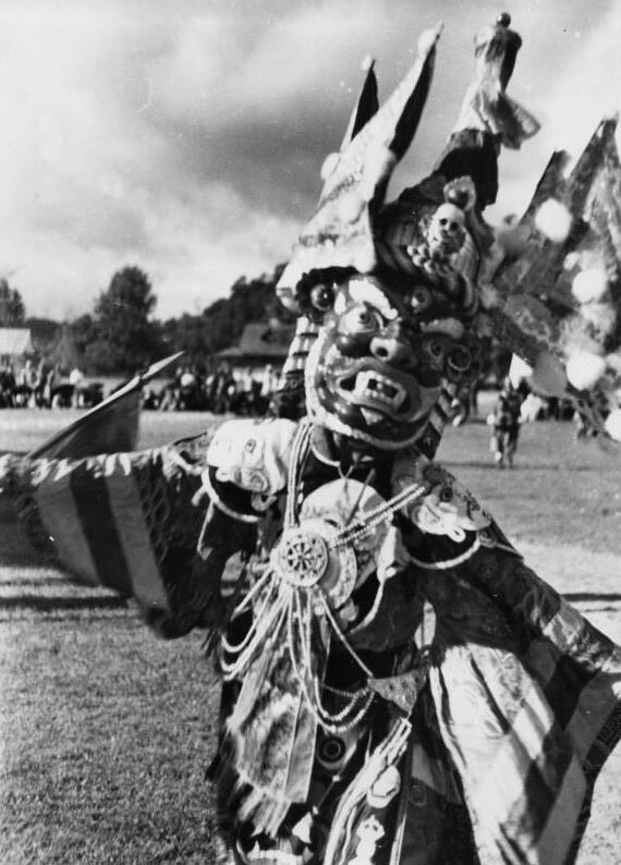 Der Gott Kantschendzönga